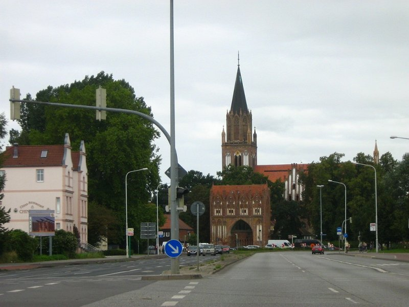 Die Neustrelitzer Straße in Neubrandenburg.